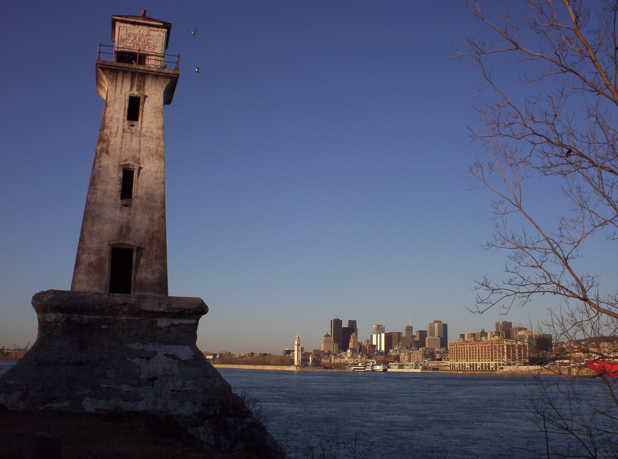 Phare de l'île Sainte-Hélène, Montréal, Québec